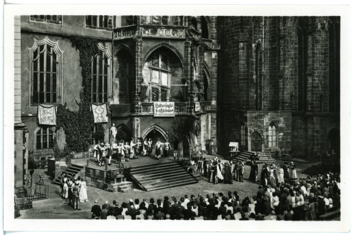 Meißen; Albrechtsburg, Burgfestspiele This postcard is from publisher Brück & Sohn in Meißen ( postcard has a unique number 28518 and is available in a higher resolution at the publisher. This images was uploaded in a cooperation project between Wikipedians and the publisher.